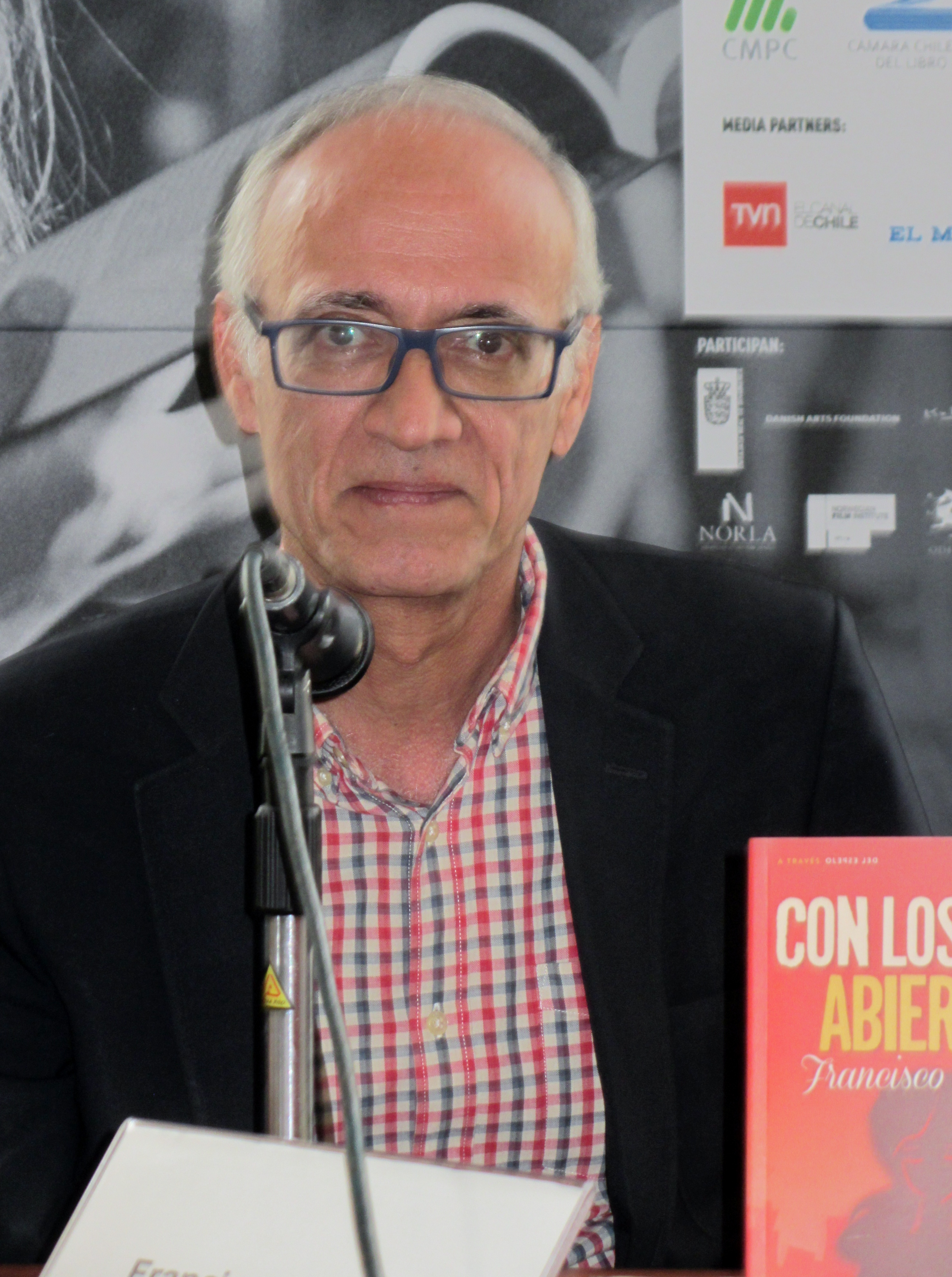 El escritor mexicano Francisco Hinojosa en la Feria Internacional del Libro de Santiago 2015